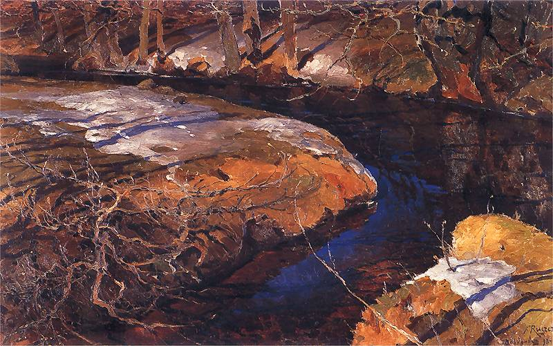 Ostatnie śniegi